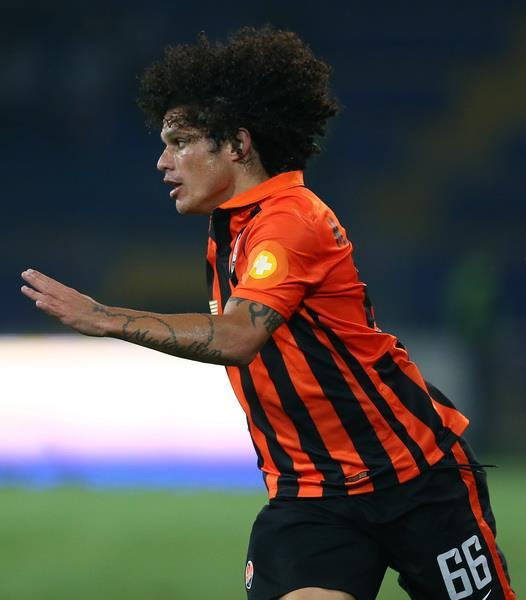 Марсіо Асеведо під час виступів за Шахтар